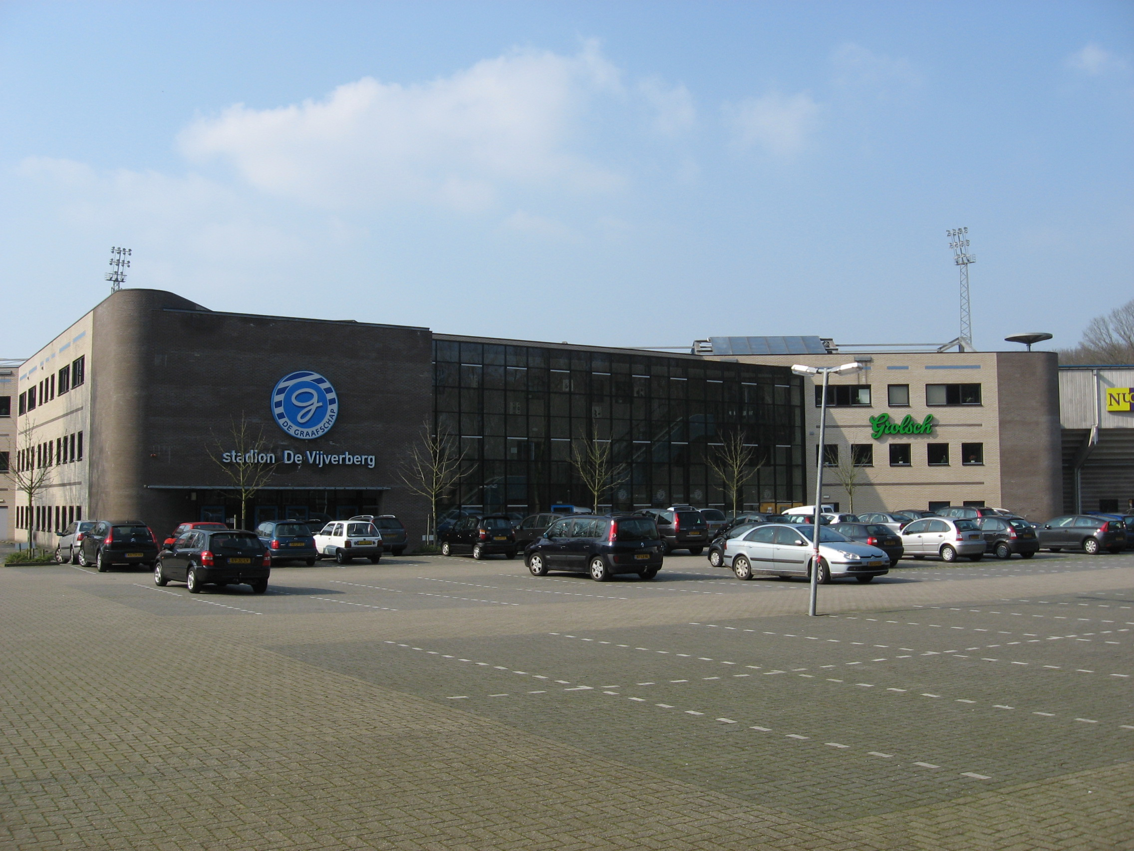 De Vijverberg Stadion in Doetinchem (The Netherlands).